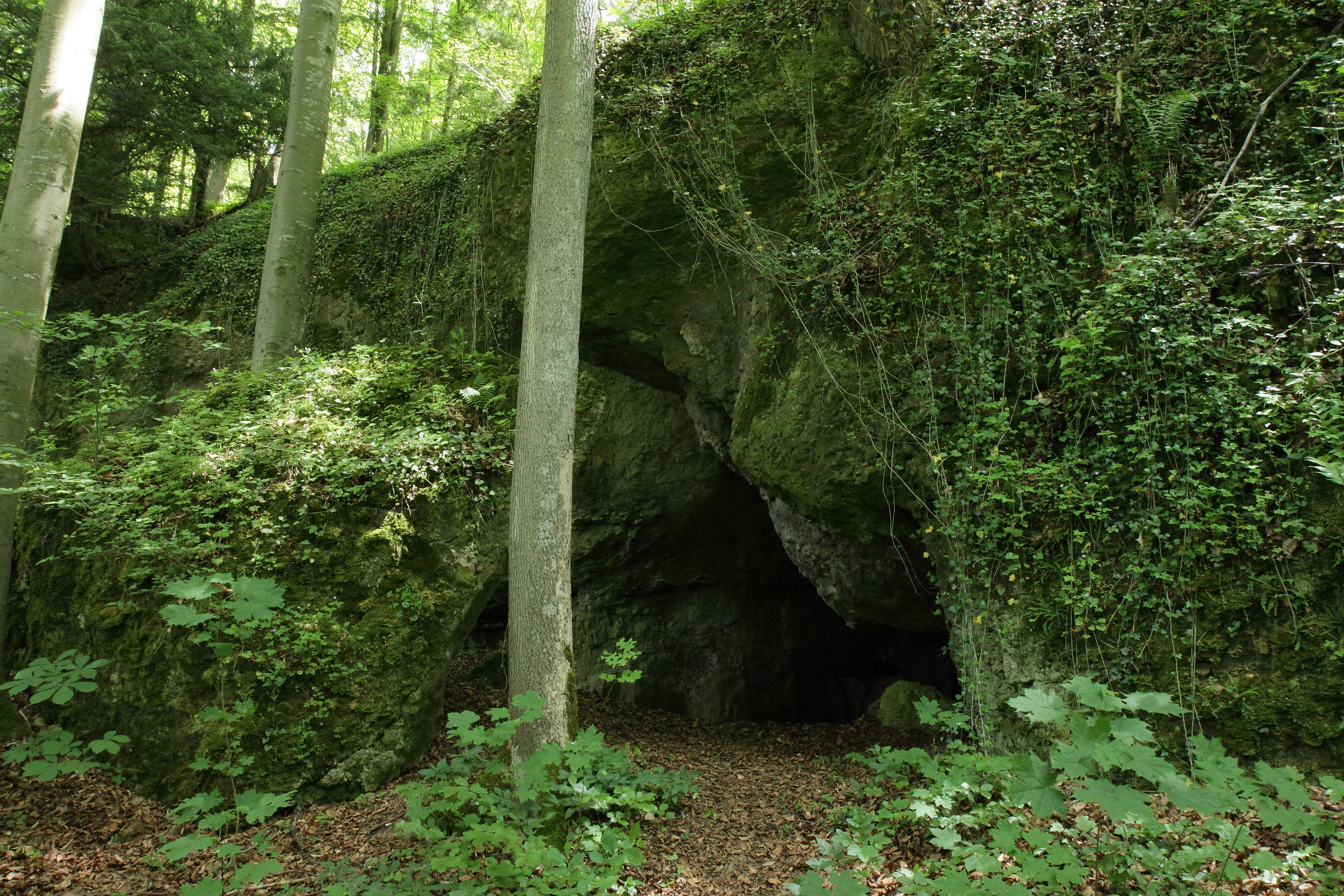 Bodendenkmal D-3-6435-0053: Höhle "Vogelloch" oder "Theodorshöhle" (A 85) mit vorgeschichtlichen und mittelalterlichen Funden.